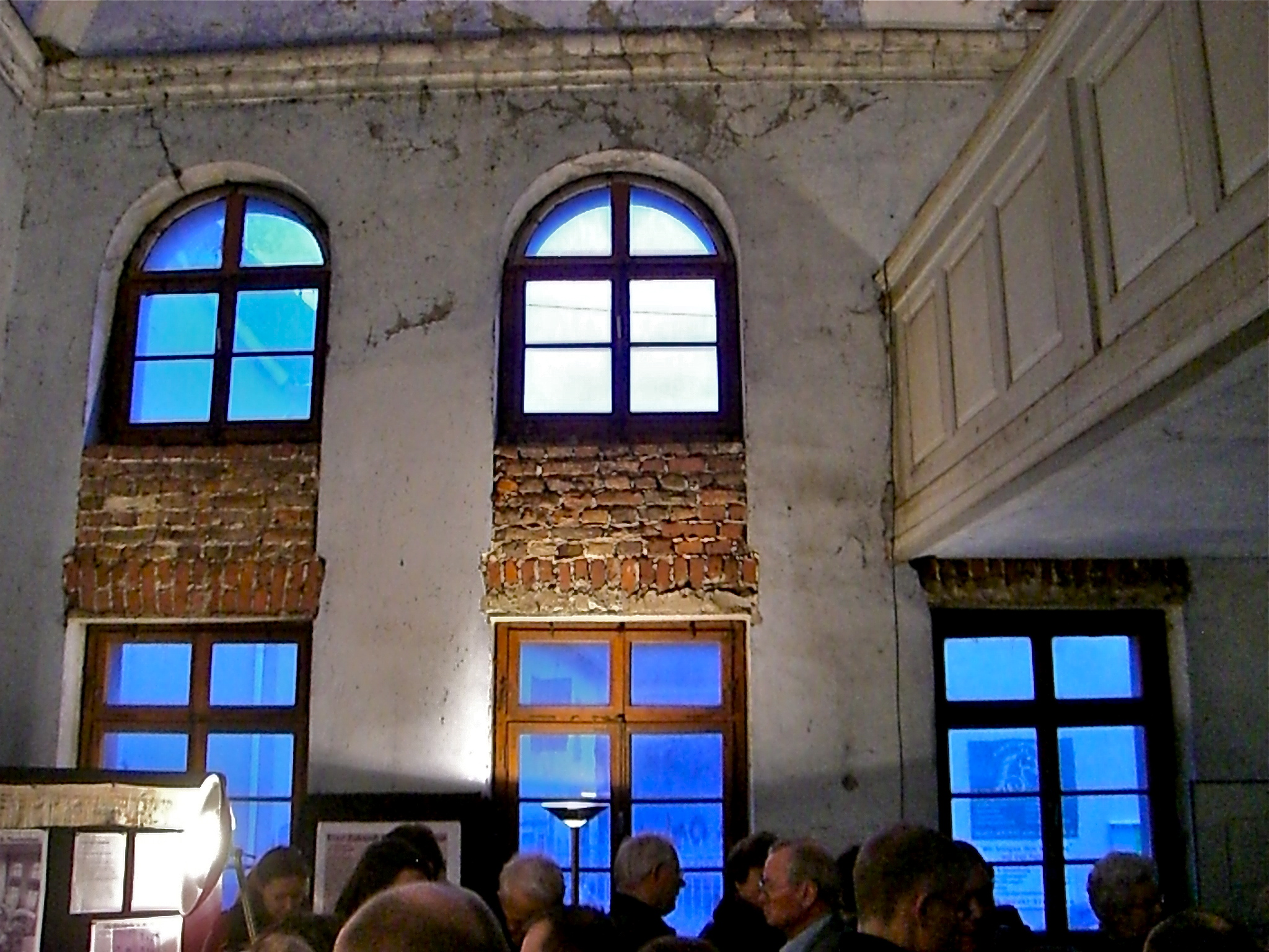 Interior of synagogue in Schupbach.